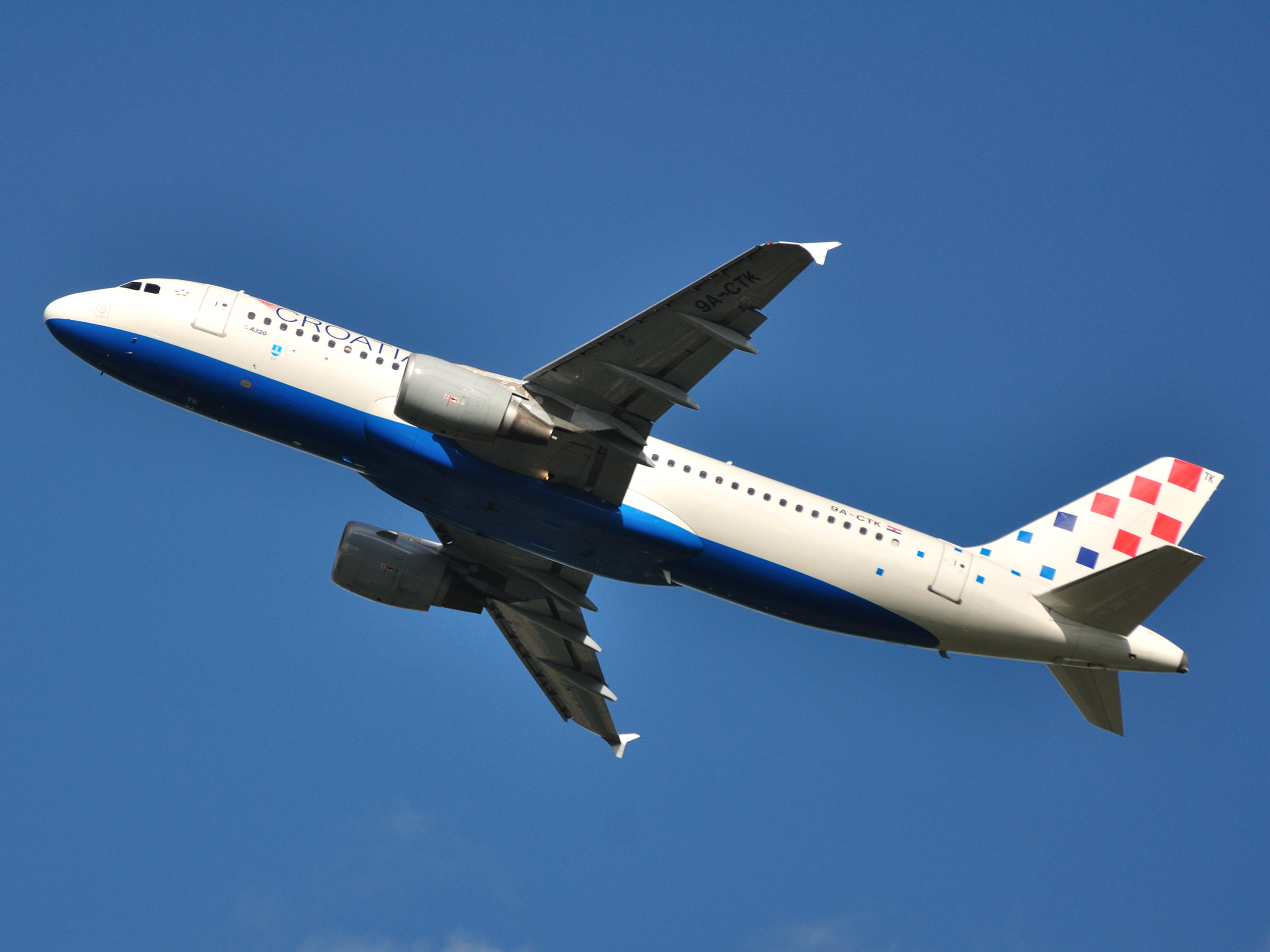 Croatia Airlines A320-214 9A-CTK